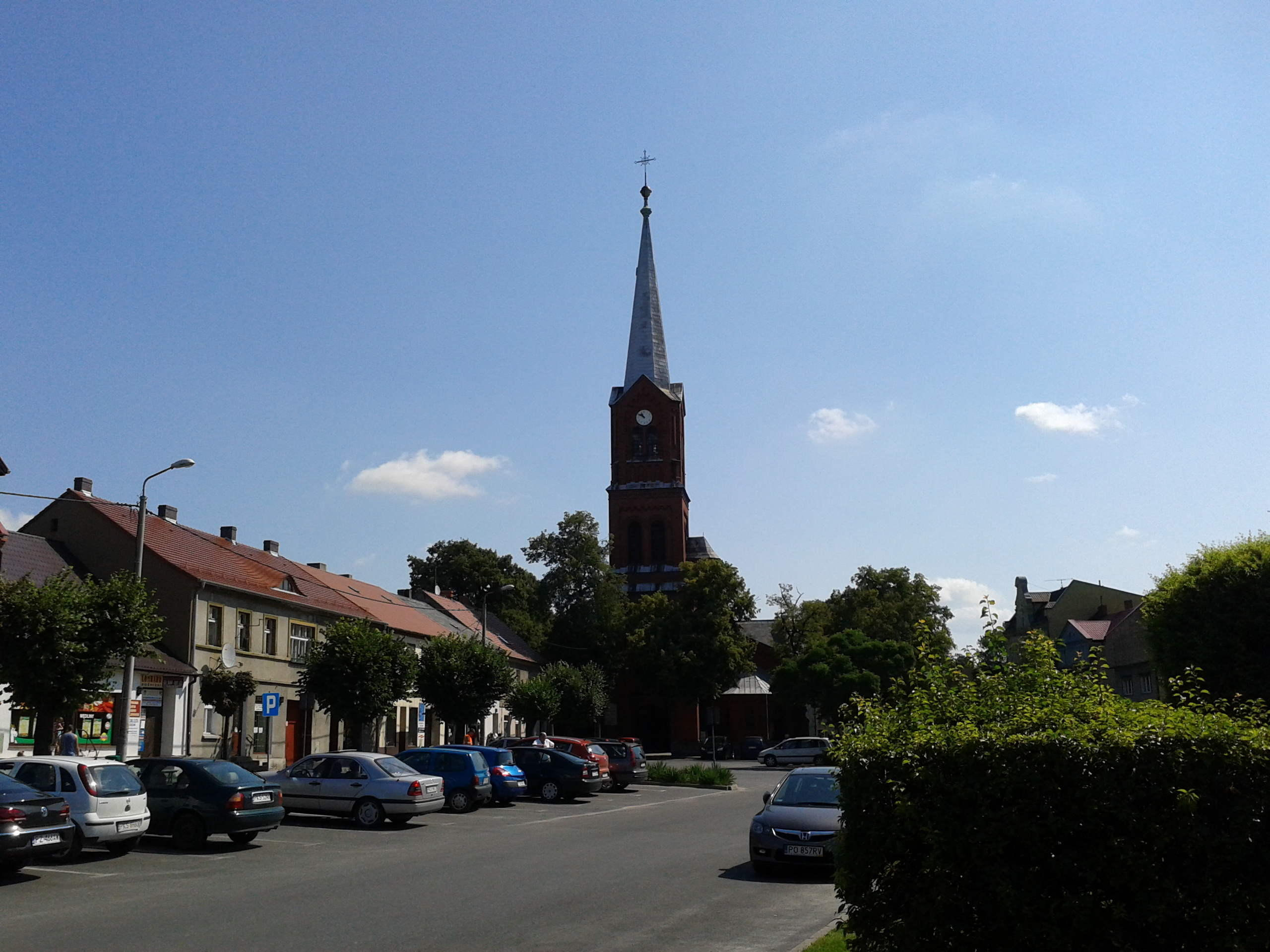 Czempiń - kościół pw. św. Michała Archanioła, 1899 (zabytek nr 2624/A)